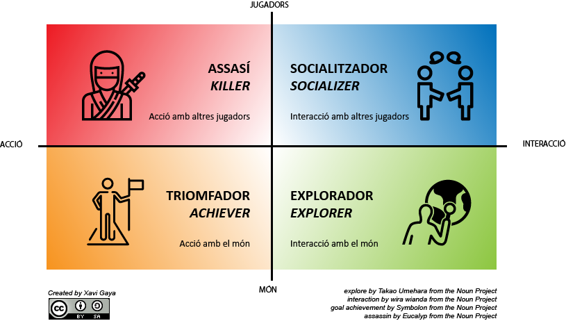 Segons R. Bartle existeixen 4 tipus de jugadors: els assassins, els exploradors, els socialitzadors i els triomfadors